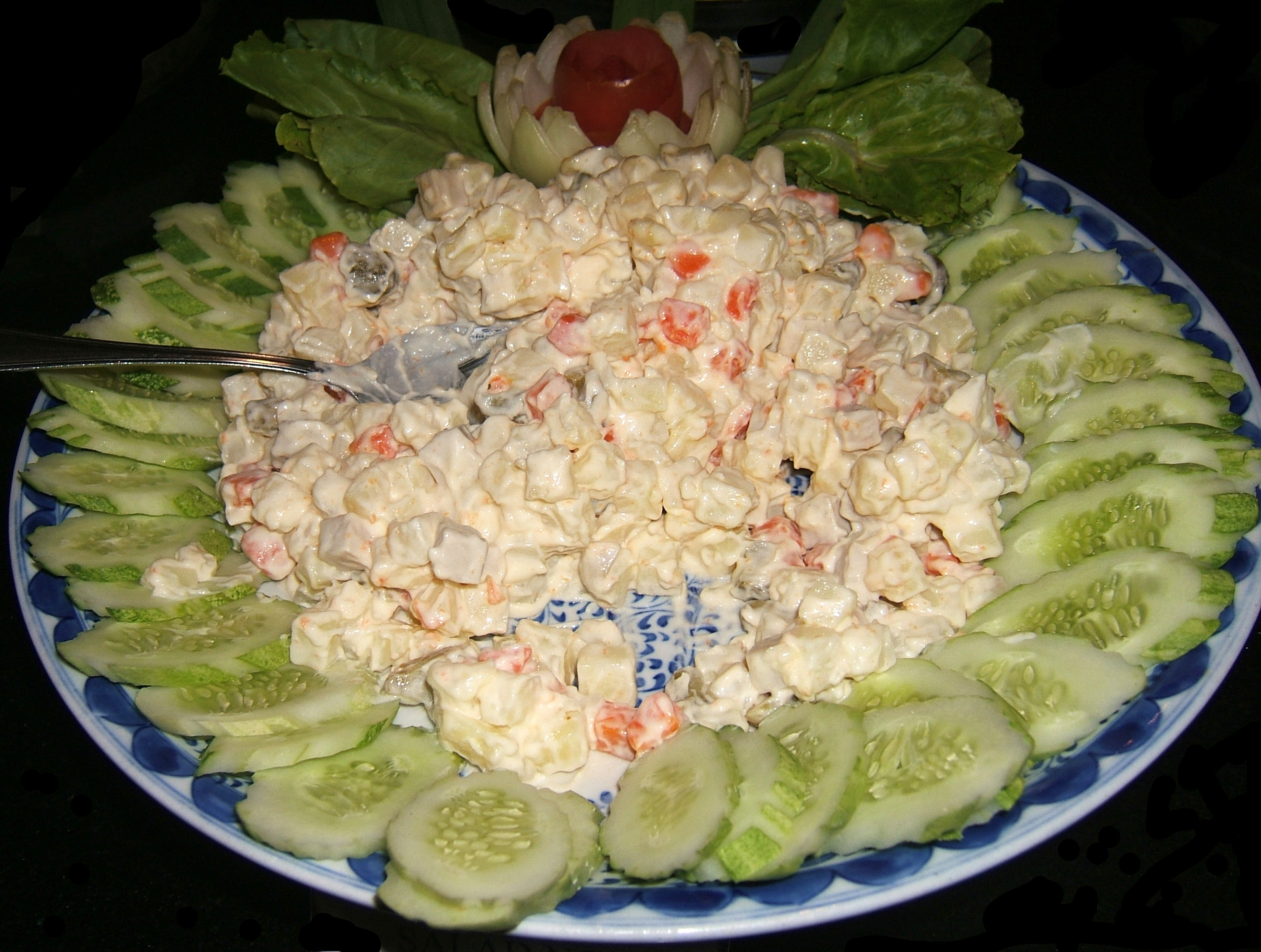 Салат Оливье в Ханое, Вьтенам